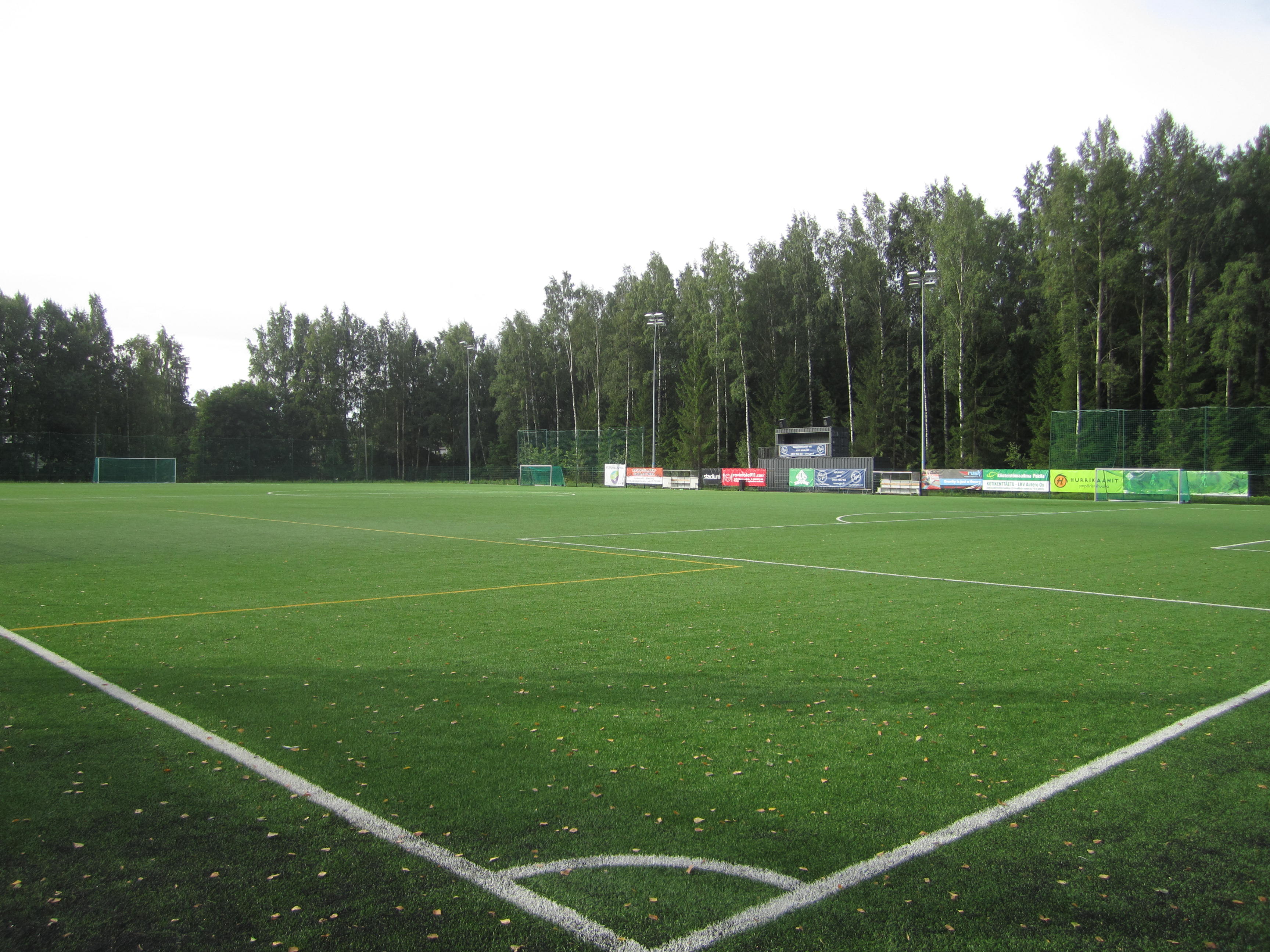 Heeros Areena (nyk. JYA Housing Areena) Helsingin Paloheinässä 26.8.2017.